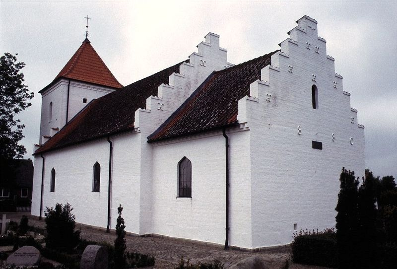 Linnerup kirke ligger i Linnerup Sogn, i det tidligere Vrads Herred Skanderborg Amt, nuværende Hedensted Kommune, Region Midtjylland. Kirken var muligvis viet til Sankt Peter i middelalderen. Kirken blev opført i romansk tid med blev næsten nybygget i forbindelse med en restaurering i 1866, d